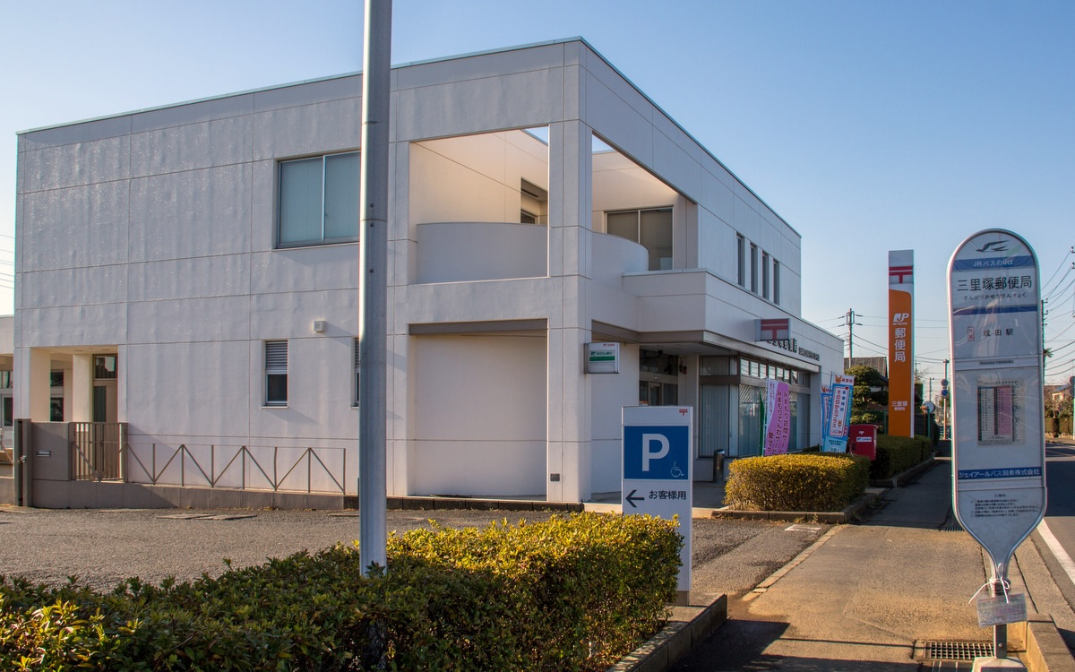 成田市 三里塚郵便局